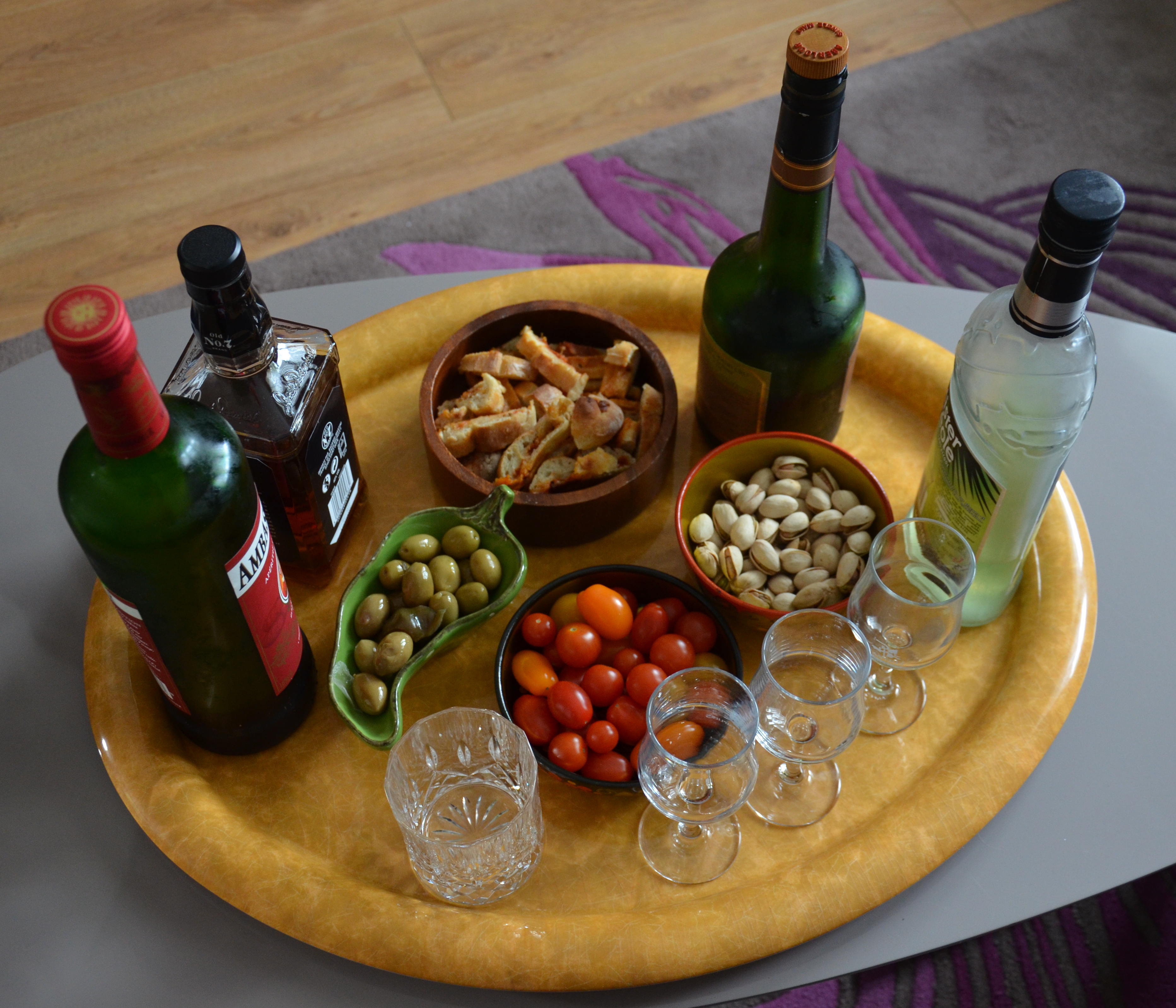 Apéritif pour quatre.